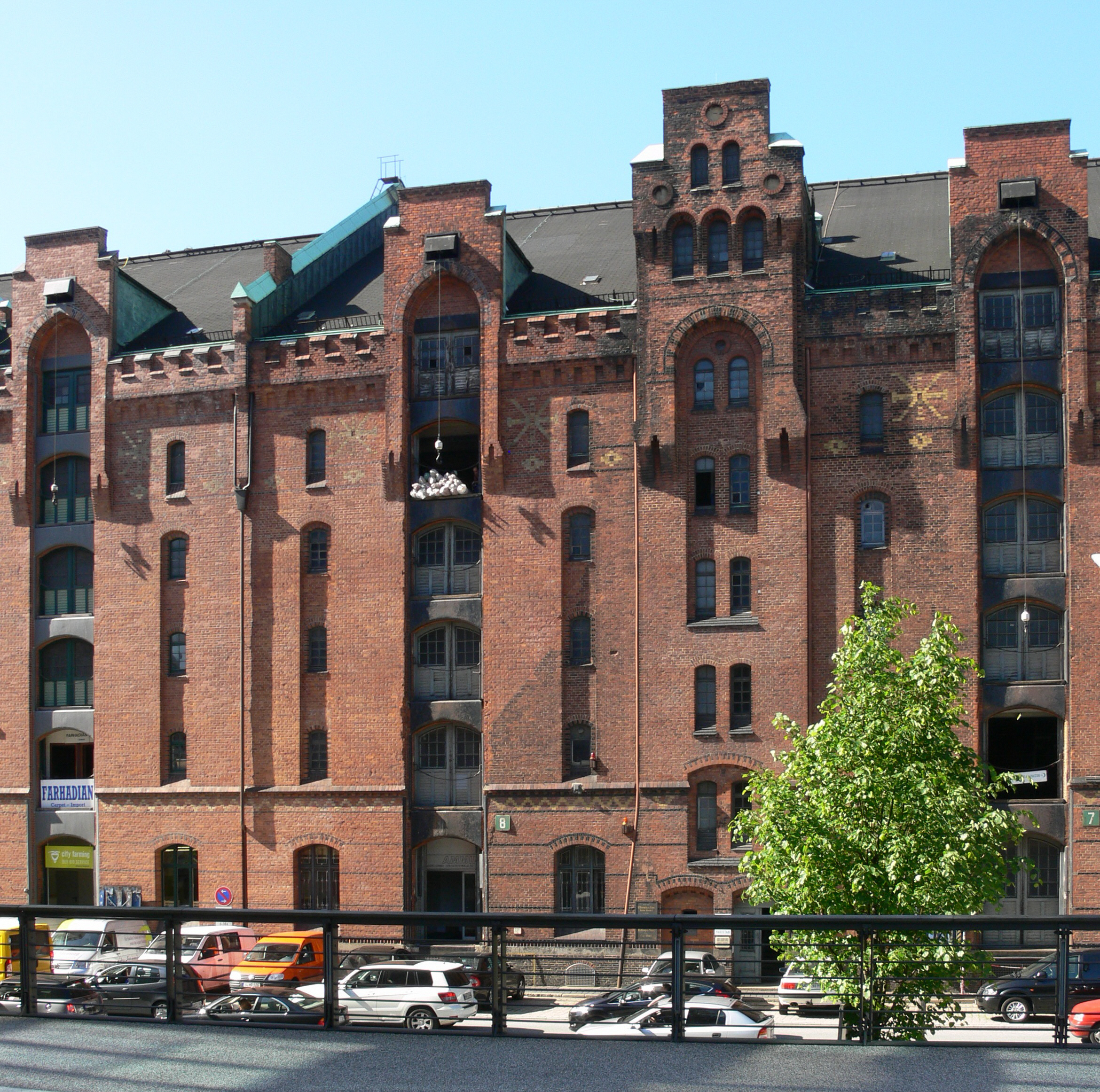 Hamburg, Speicherstadt, Speicher mit Teppichhandel (Sandtorkai) This is a photograph of an architectural monument.